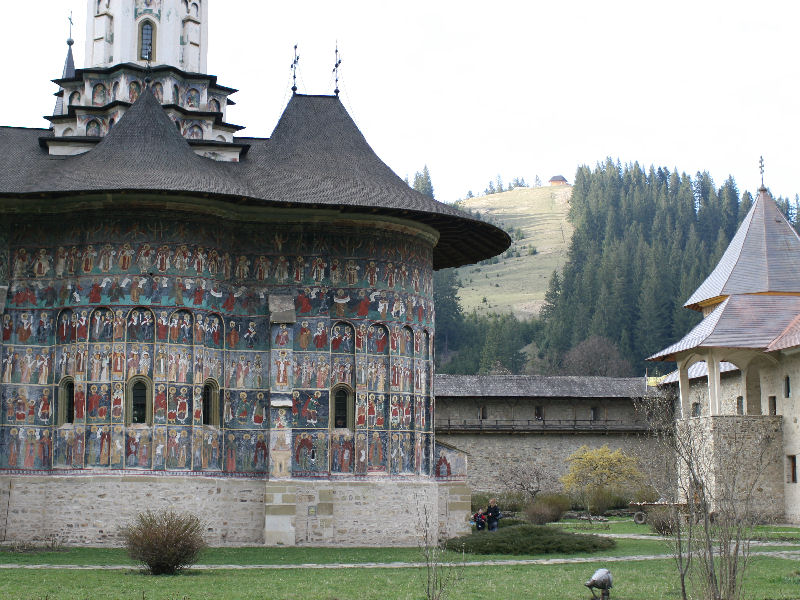 Manastirea pictata Sucevita, monument UNESCO; foto Iulian Hopulele 03